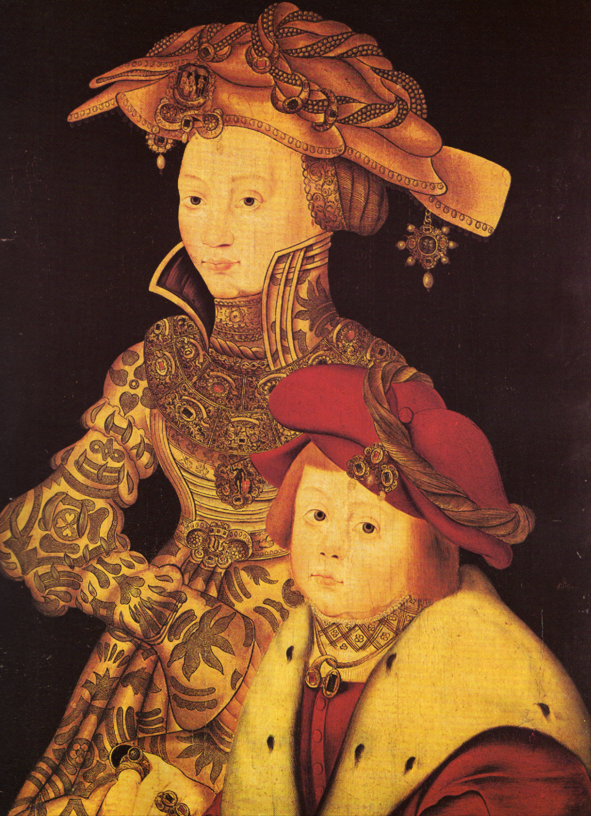 Pasticcio-Fälschung des Nürnberger Malers Franz Wolfgang Rohrich (1787–1834) im Stile Lucas Cranachs des Jüngeren. Das Bild verwendet Bildmotive des jüngeren Cranach und komponiert damit ein vollkommen neues Phantasiemotiv. (Quelle: M. Hofbauer: Die Porträtkunst Lucas Cranachs d.Ä. – Zuschreibung und Identifikation der im Louvre bewahrten Bildnisstudie eines Knaben (Inv. Nr. 19207), Diss., Heidelberg 2009) Pasticcio fake by the Nuremberg painter Franz Wolfgang Rohrich (1787–1834) in the manner of Lucas Cranach the younger. Rohrich used parts of Cranach paintings to compose completely new fake paintings. (Source: M. Hofbauer: Die Porträtkunst Lucas Cranachs d.Ä. – Zuschreibung und Identifikation der im Louvre bewahrten Bildnisstudie eines Knaben (Inv. Nr. 19207), Diss., Heidelberg 2009)